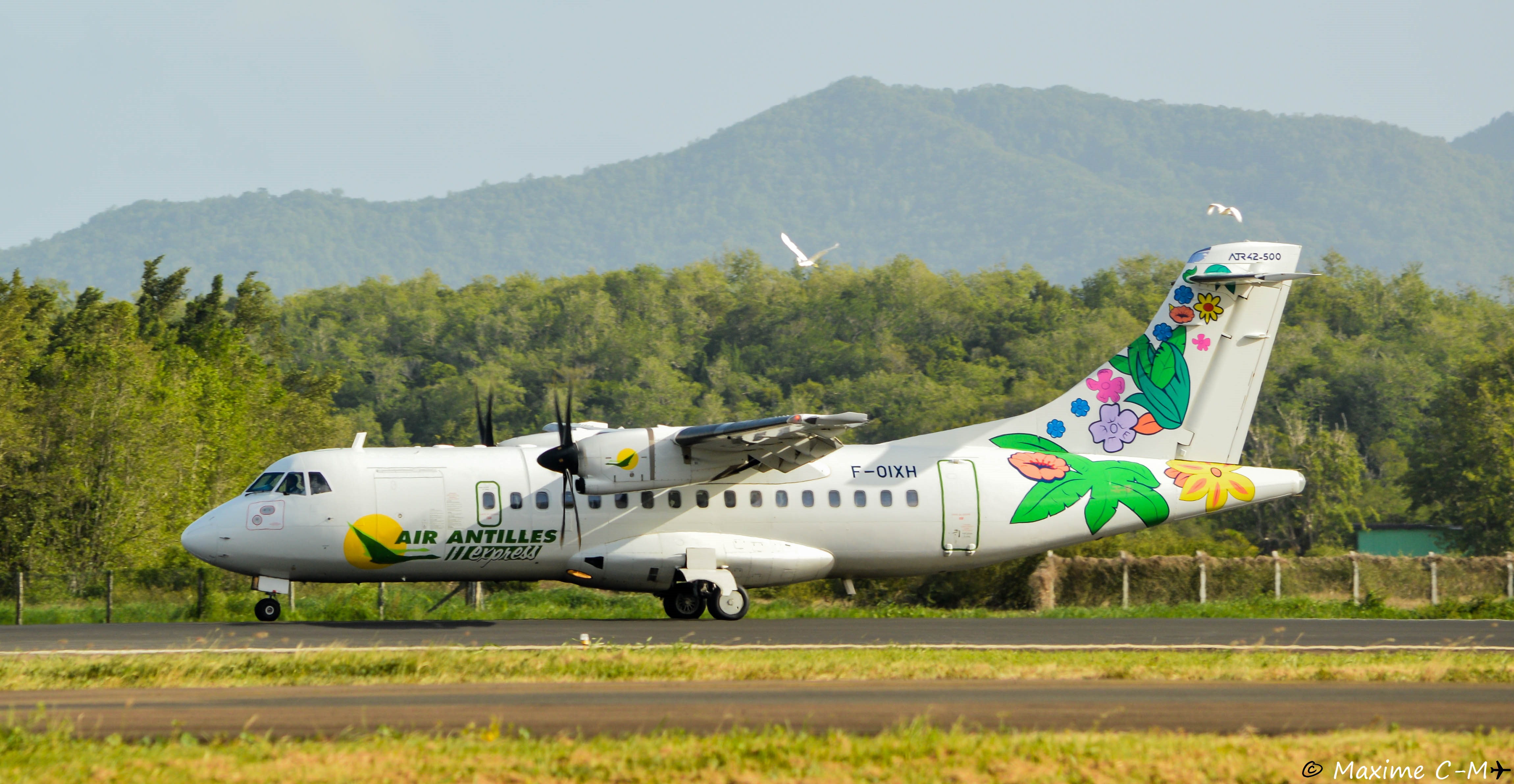 3S F-OIXH